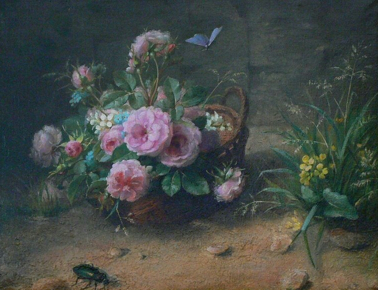 Alice Vasselon ( 1849-1893), Panier de fleurs au papillon et au scarabée huile sur toile, coll. part.